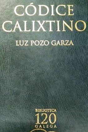 Detalle da portada dun volume de Códice Calixtino de Luz Pozo Garza, da Biblioteca Galega 120.